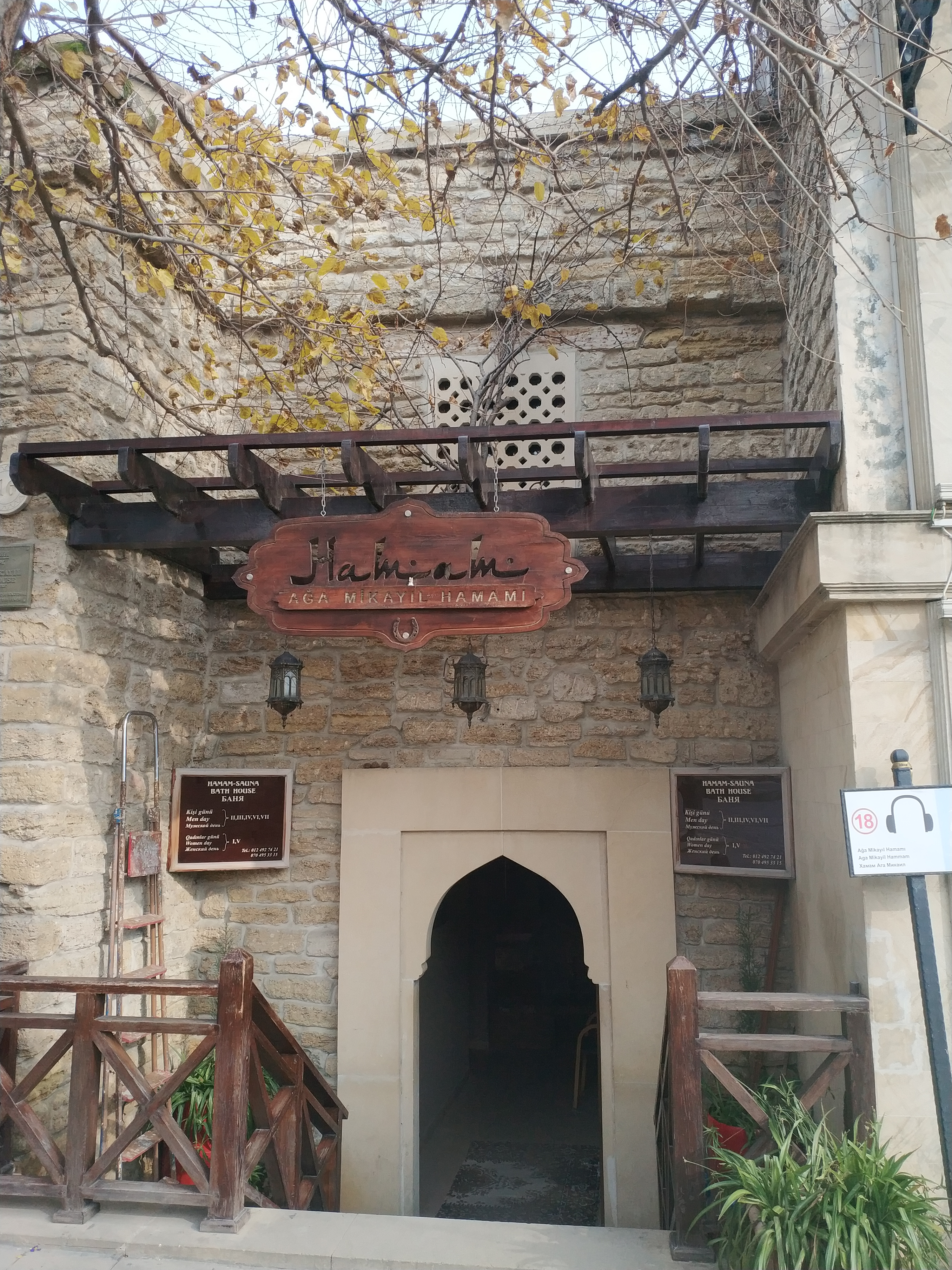 حمام أغا ميكاييل في المدينة القديمة